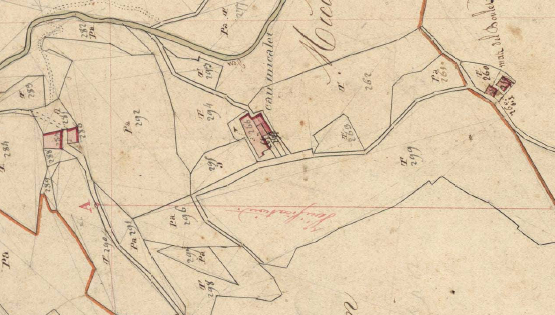 Els Masos, de Bula d'Amunt, en el Cadastre napoleònic del 1812 (Arxius Departamentals dels Pirineus Orientals)